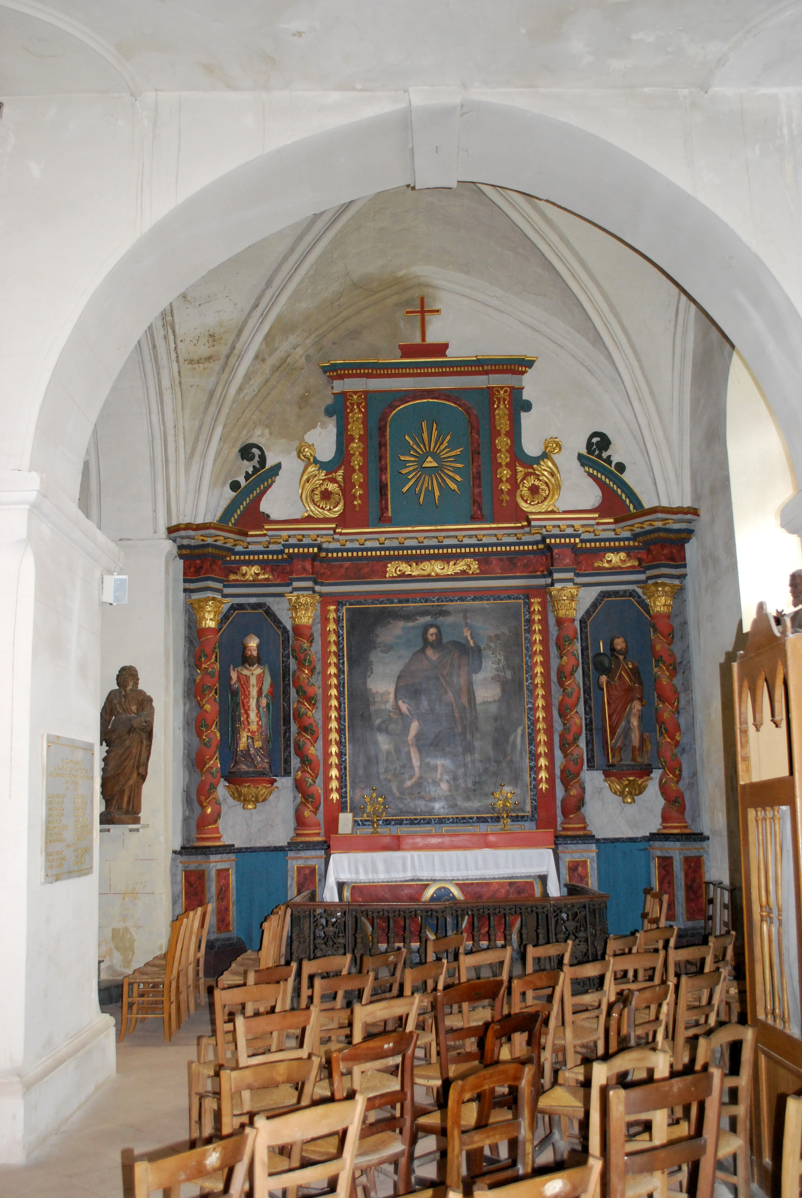 Saint-Morillon, église Saint-Maurille